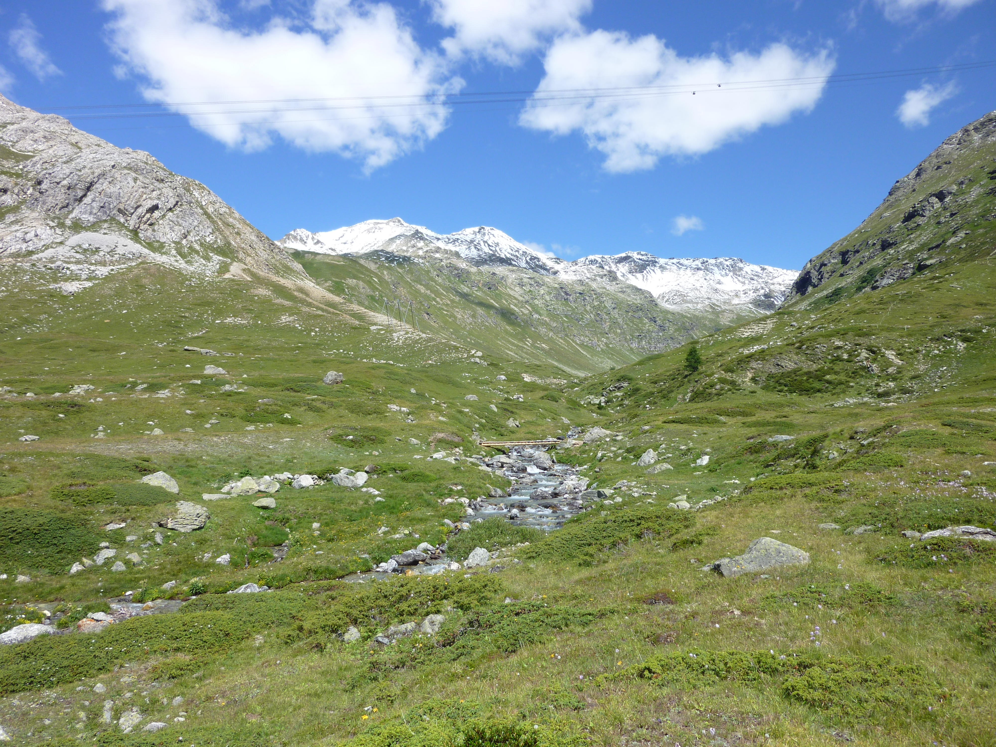 Val Minor am Berninapass